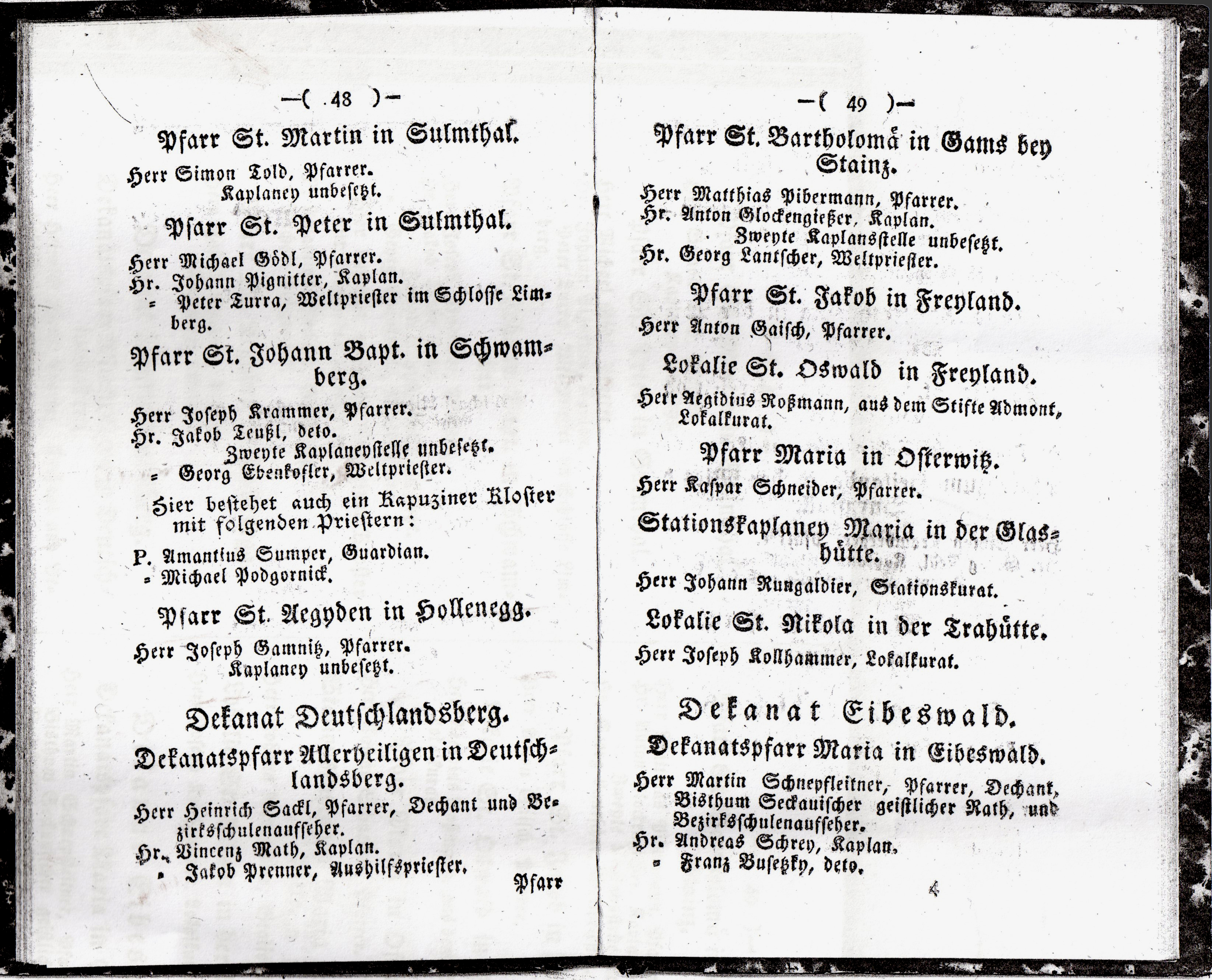 Seiten 48 und 49 aus: Personalstand der Sekular= und Regular=Geistlichkeit in der Seckauer=Diözese für das Jahr 1817. Abgeschlossen am 16. November 1816.